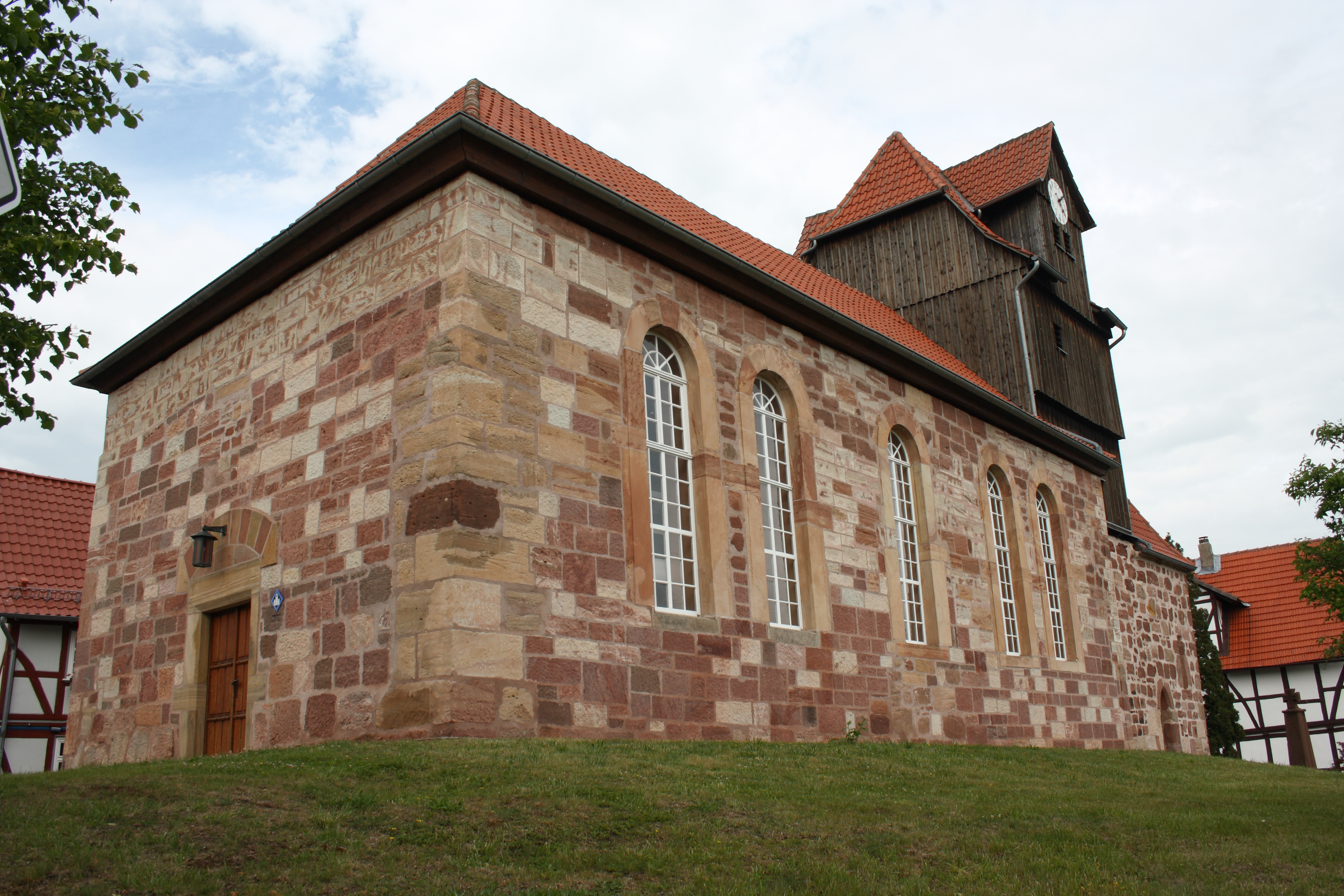 Evangelische Pfarrkirche von Niederdünzebach, einem Stadtteil von Eschwege im Werra-Meißner-Kreis (Hessen)